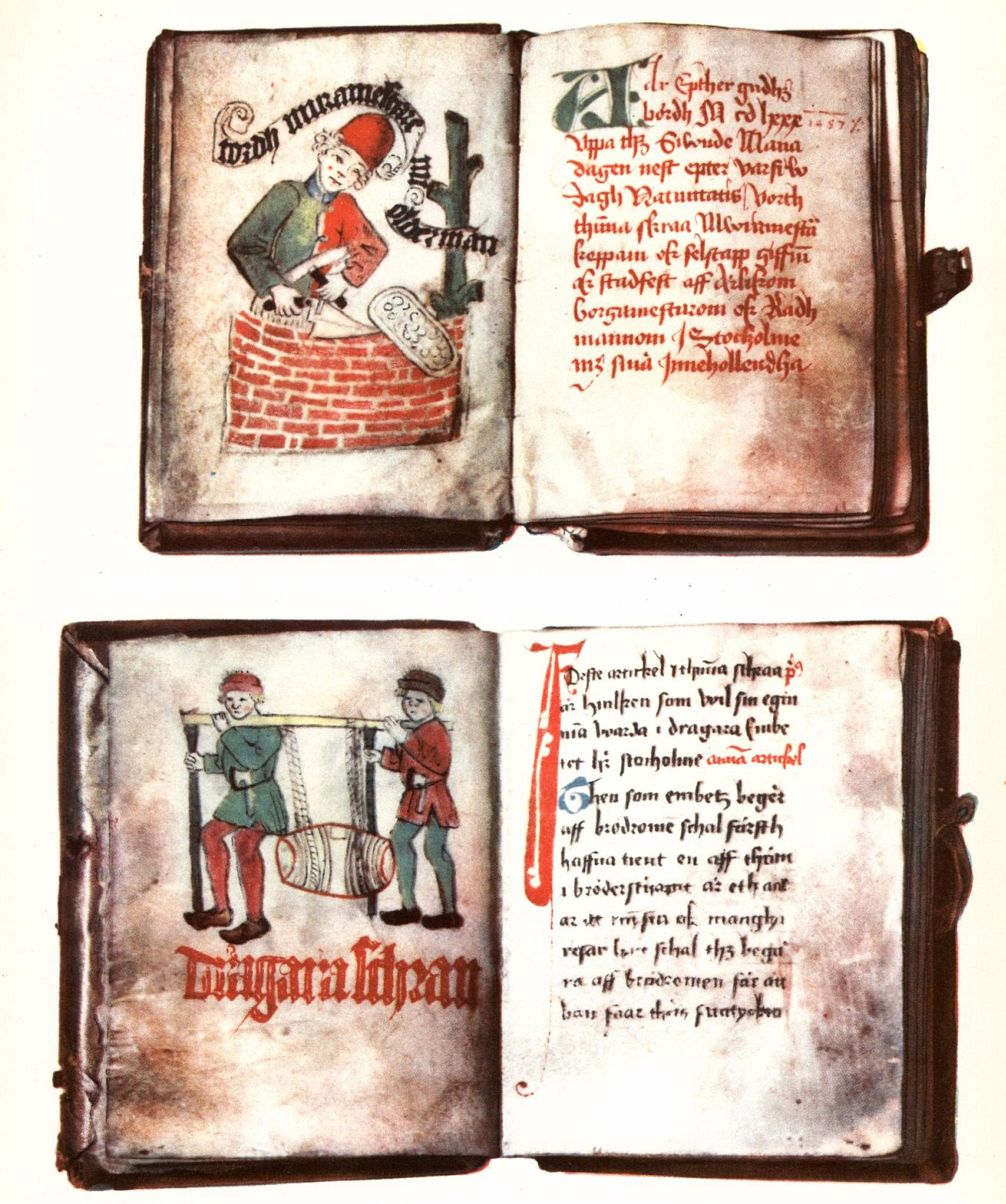 Guilds of Stockholm. Skråordningar för murarna och vindragarna.